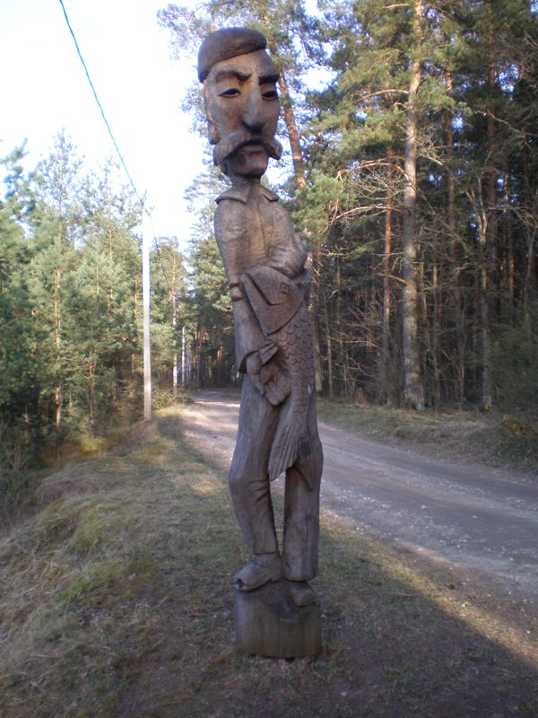 Medinė žvejo skulptūra Babėnų miške, šalia karjero 2007.04.15 Foto: Hugo.arg